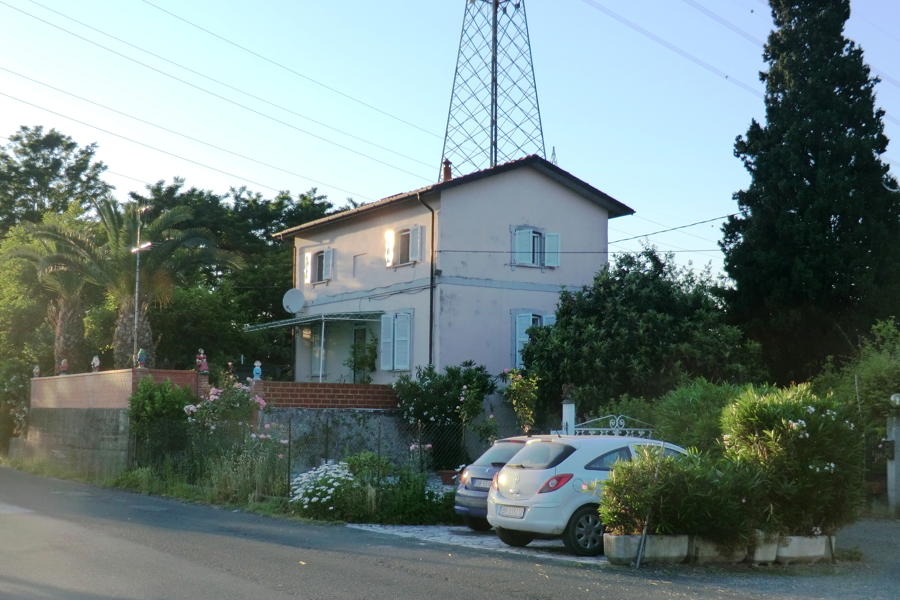 Casello a Romito